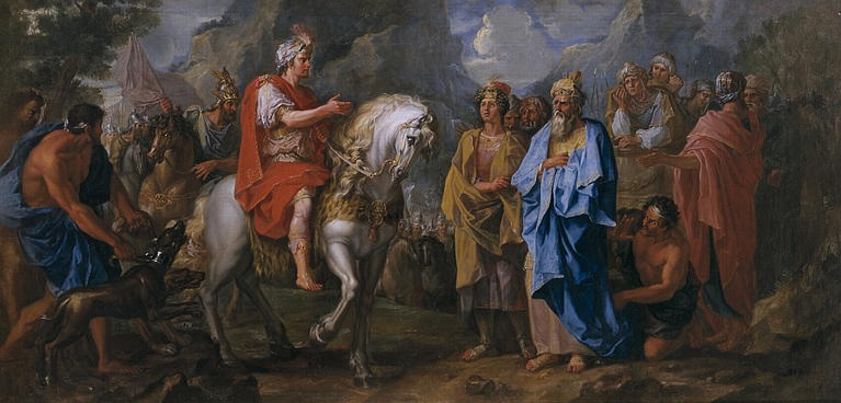 Cyrus interrogeant le roi d'Arménie, Noël Coypel. Musée de Grenoble.